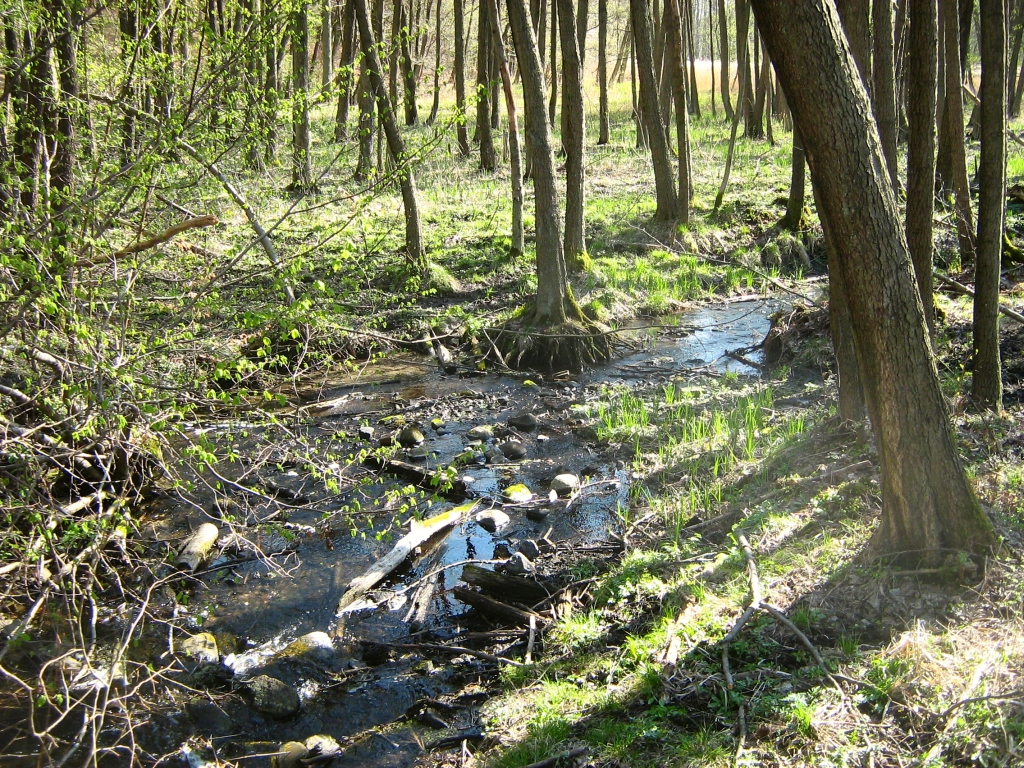 Das Pölzer Fließ im Naturschutzgebiet „Gramzow-Seen“ (zum Aufnahmezeitpunkt war dieses NSG noch nicht festgesetzt, sondern „im Verfahren“; Stand:3/2009). Das Pölzer Fließ entspringt ca. 2 km östlich von Altglobsow und mündet nach Passage des Großen- und des Kleinen Gramzower Sees in den Polzowkanal, gehört also zum Flußsystem der Havel. Der Bach ist naturbelassen und mäandriert stark. Er fließt durch eine beeindruckende Schlucht in der Granseeer Platte. Das Bachtal ist ein kalkreiches Niedermoor mit Braunmoos-Großseggenried-Pflanzengesellschaften.